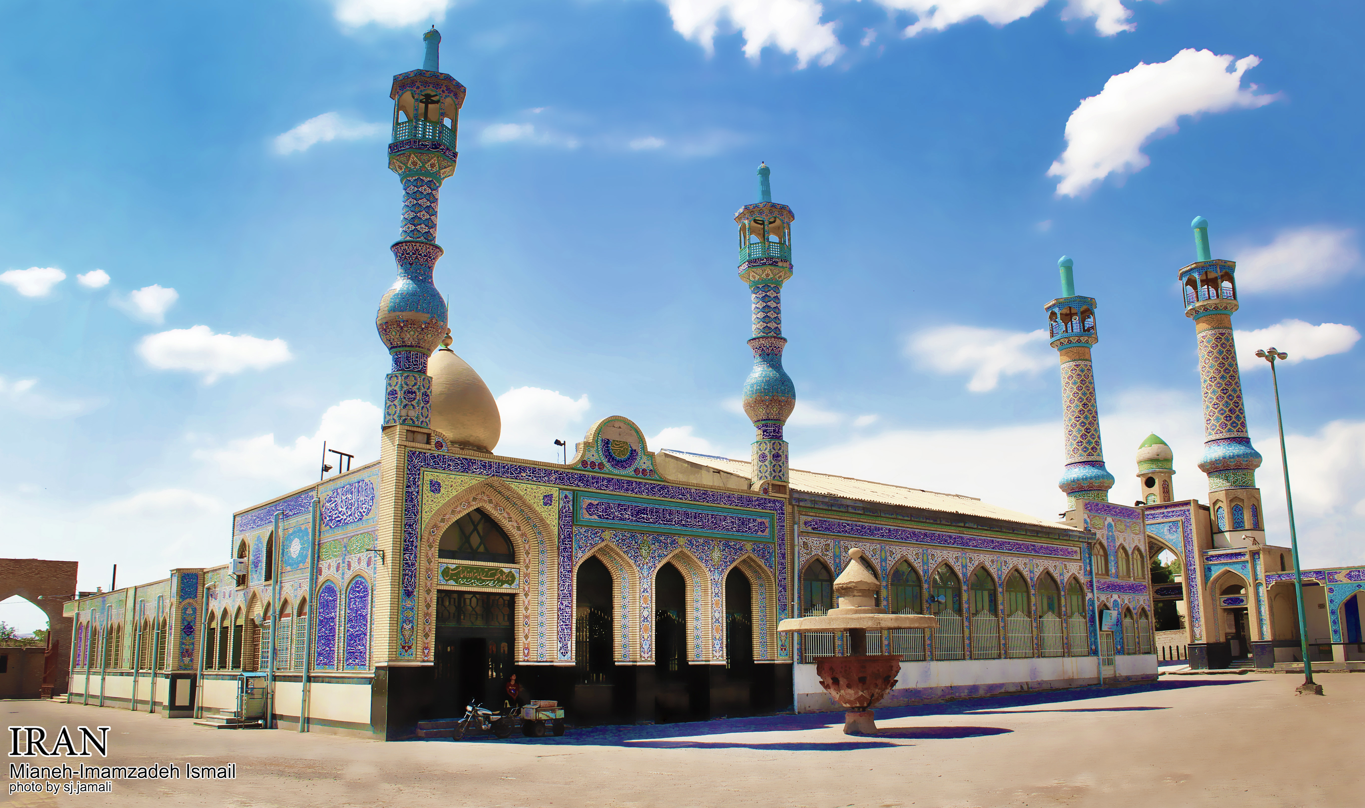 شهرستان میانه - صحن امامزاده اسماعیل از نوادگان امام جعفر صادق علیه السلام